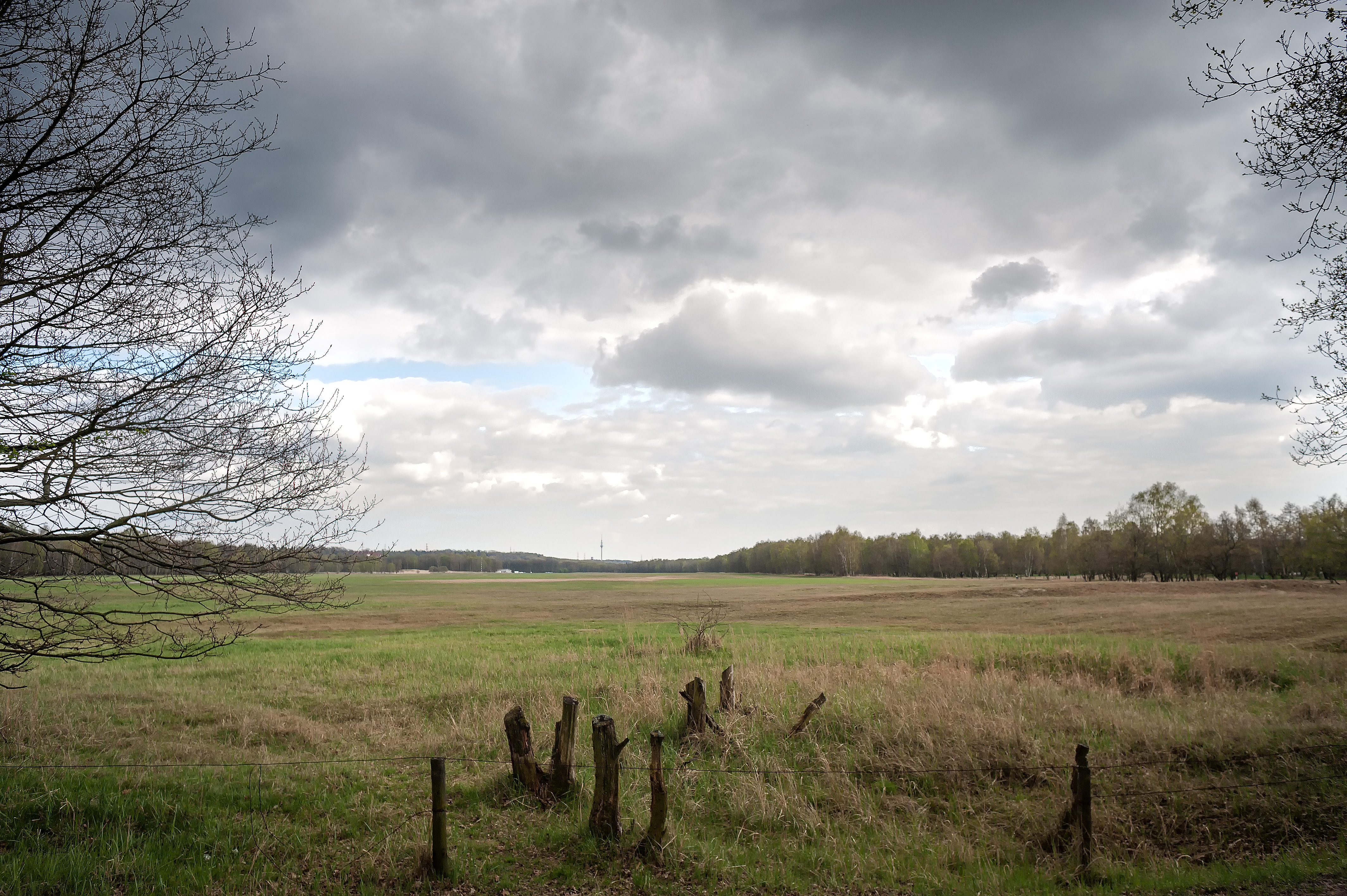 Blick über das innerhalb des Naturschutzgebiets „Boberger Niederung“ gelegene Segelfluggelände. Blick vom westlichen Ende der Start- und Landebahn. Fernmeldeturm HH-Lohbrügge im Hintergrund.